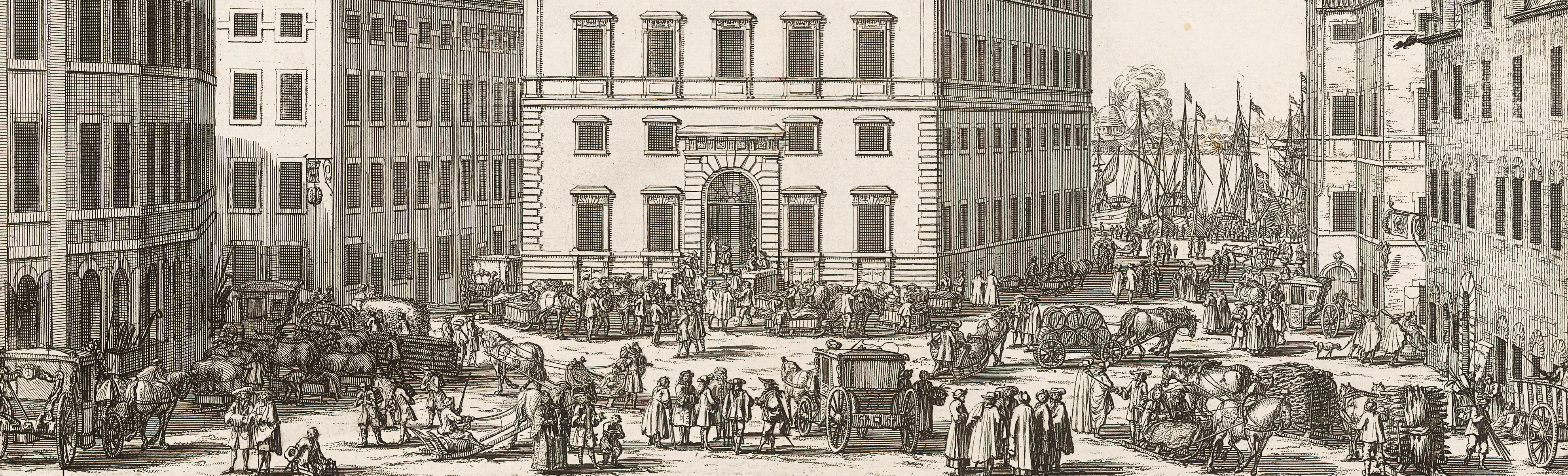 Vy över Järntorget i Stockholm